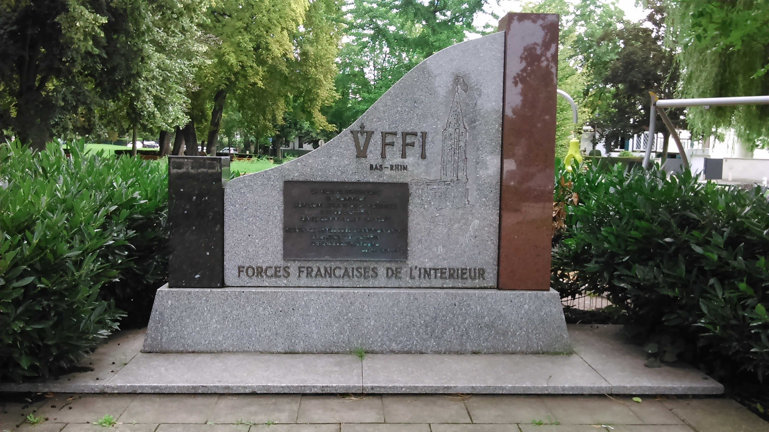 stèle des FFI à l'entrée du Parc du Tivoli au Wacken à Strasbourg.